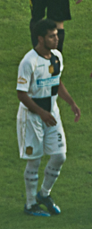 Partido Rosario Central 2-Olimpo de Bahía Blanca 2, disputado el 18 de marzo de 2013; Rafael Marcelo Delgado de Rosario Central.